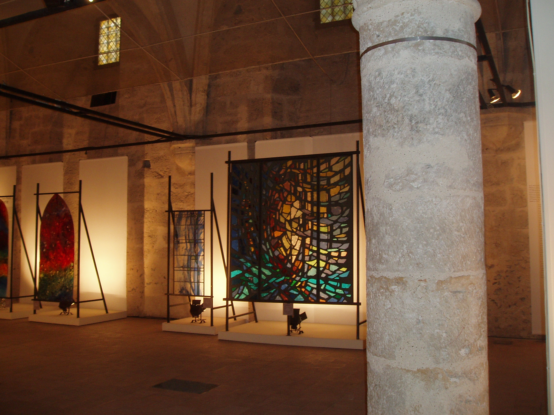 Colonne et console du cellier de Loëns, Chartres, Eure-et-Loir (France).